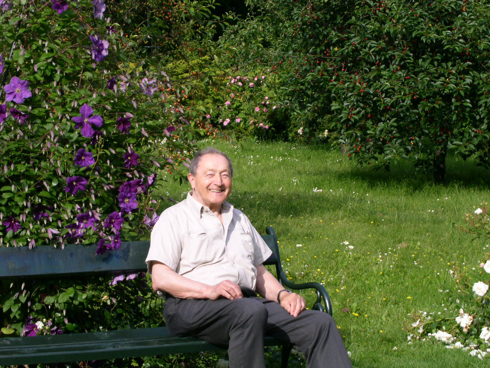 fotografie Vladimíra Lorenze z výletu do Černic v jeho pokročilém věku